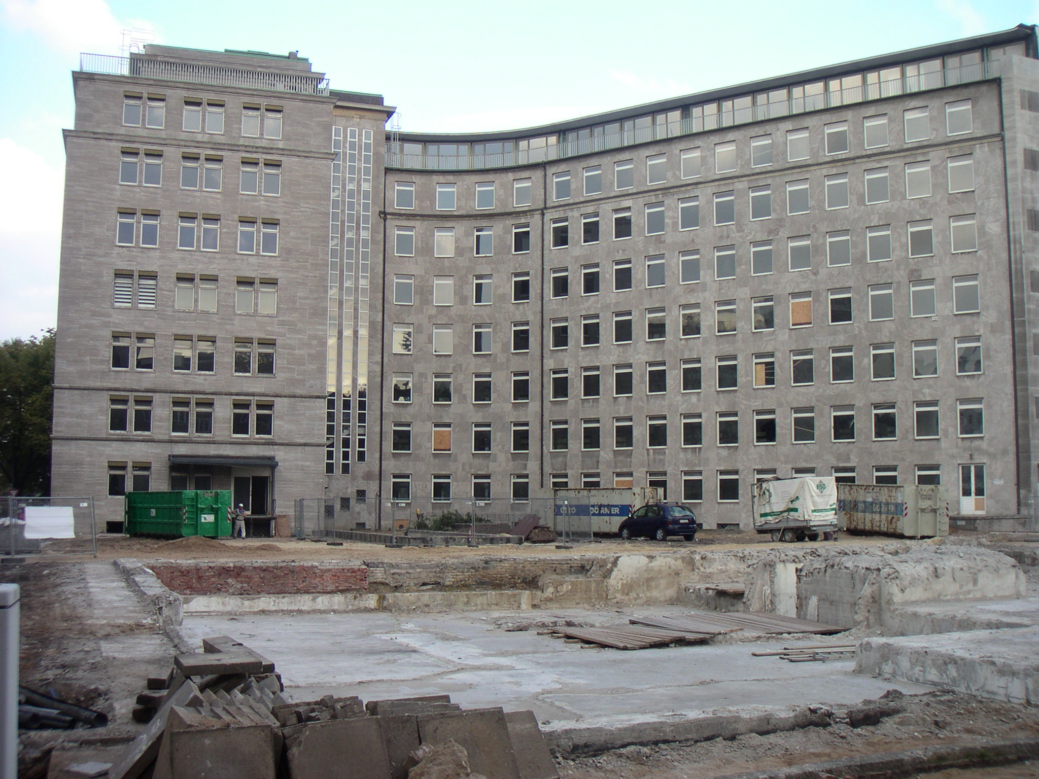 Bürogebäude Alsterufer 1 bis 3, Rückseite. 2013 abgerissen.This is a photograph of an architectural monument.